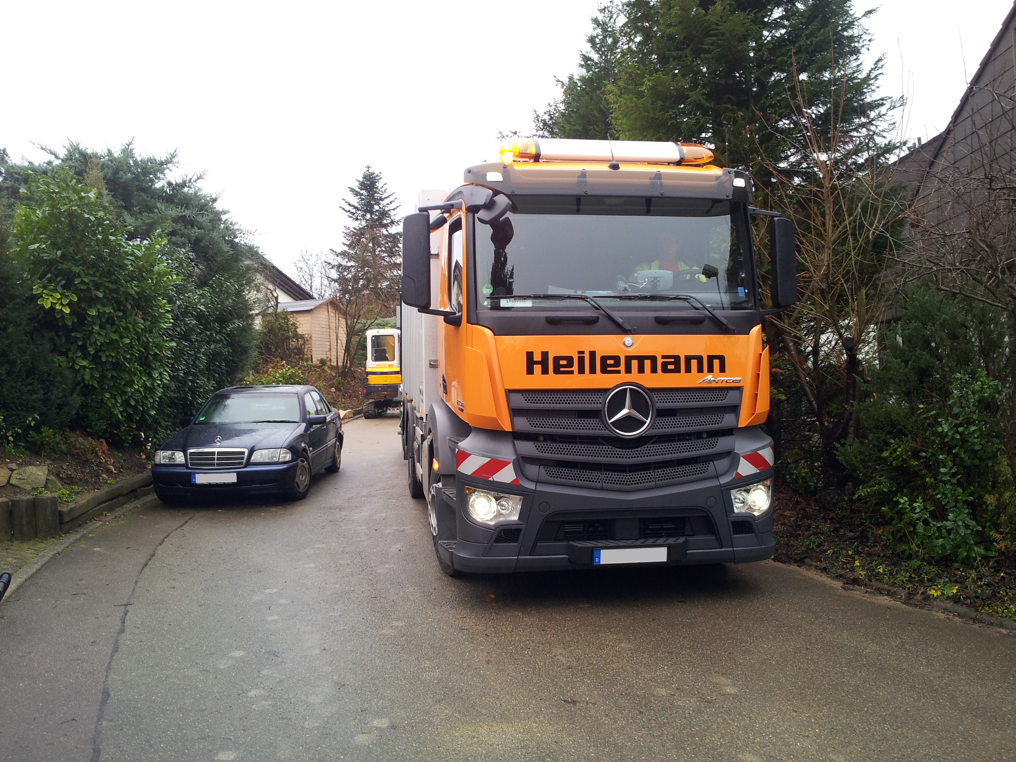 Mercedes-Benz Antos Entsorgungsfahrzeug der Firma Heilemann